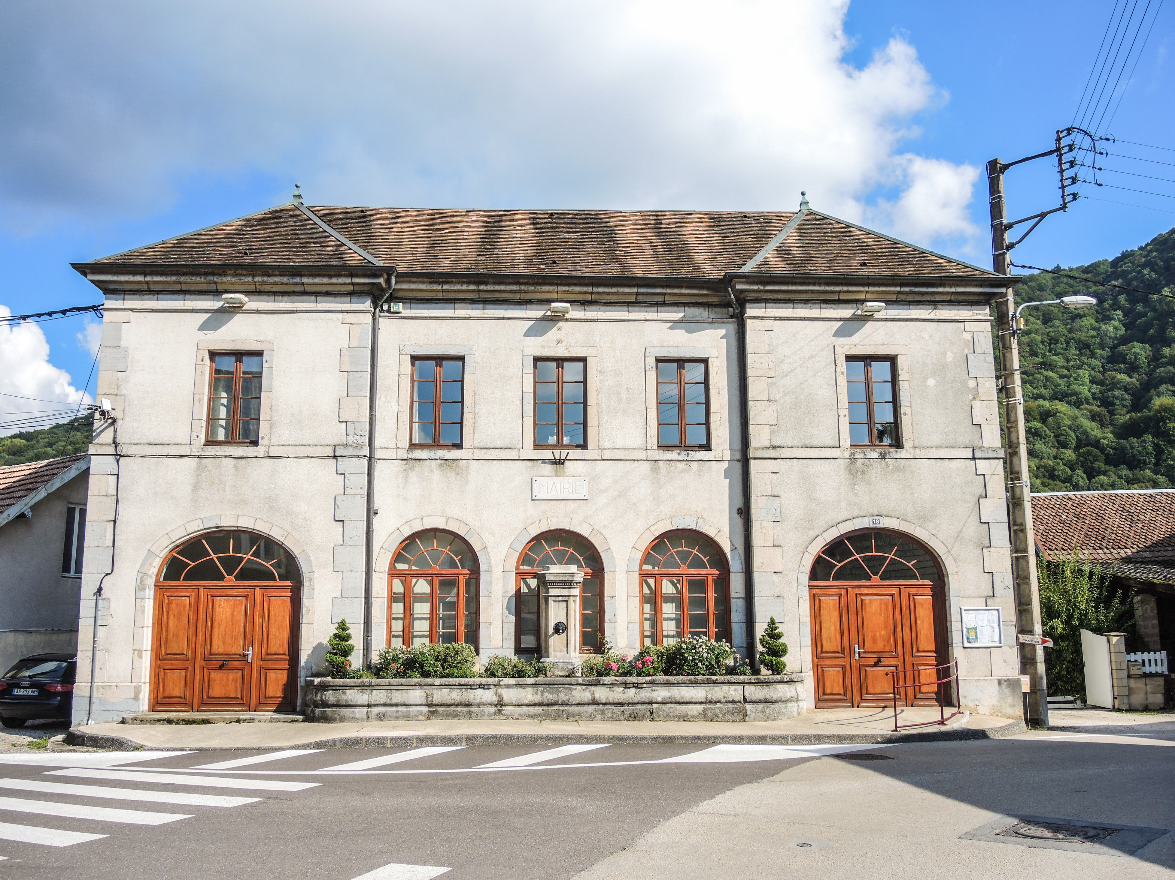 Façade de la mairie du village de Deluz. Doubs